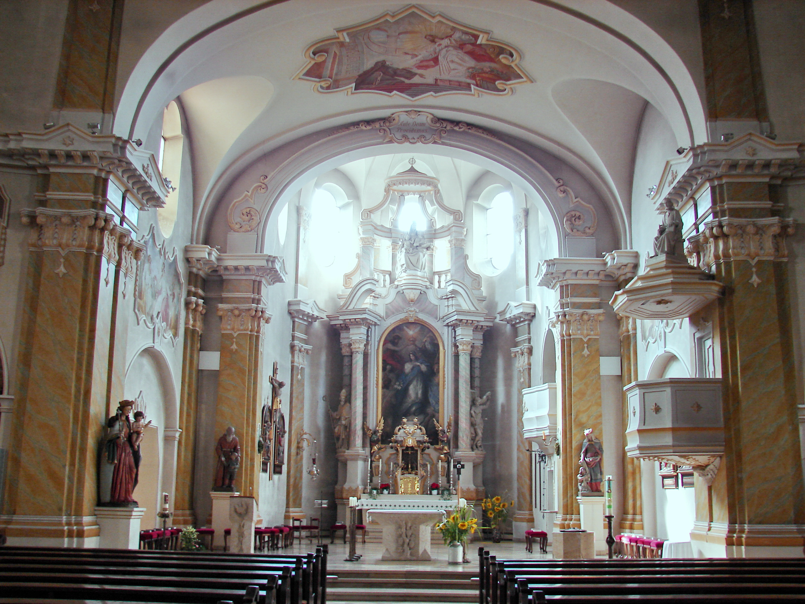 Katholische Stadtpfarrkirche Mariä Unbefleckte Empfängnis in Vohenstrauß.